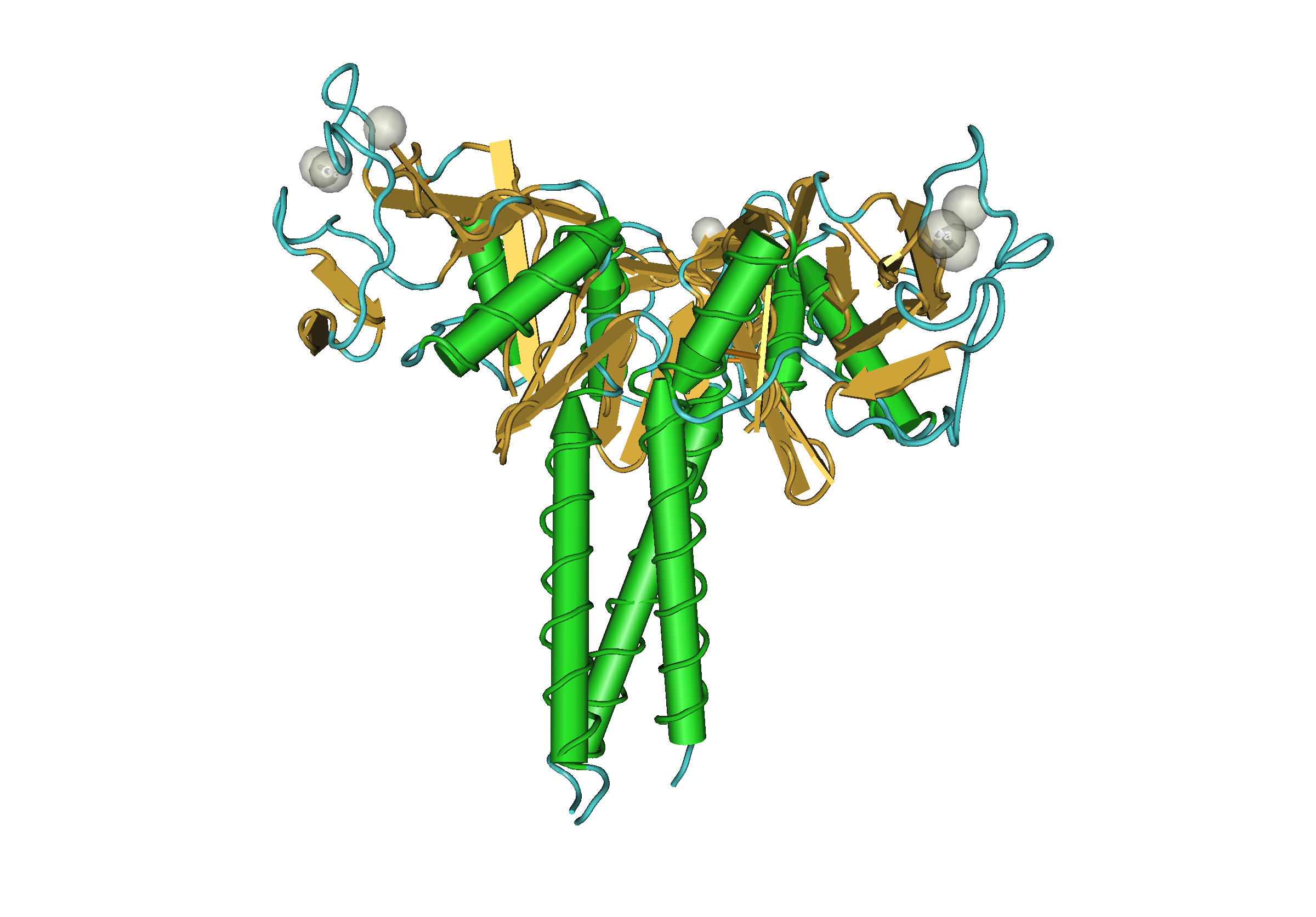 1B08_Lung_Surfactant_Protein_D_Sp-D